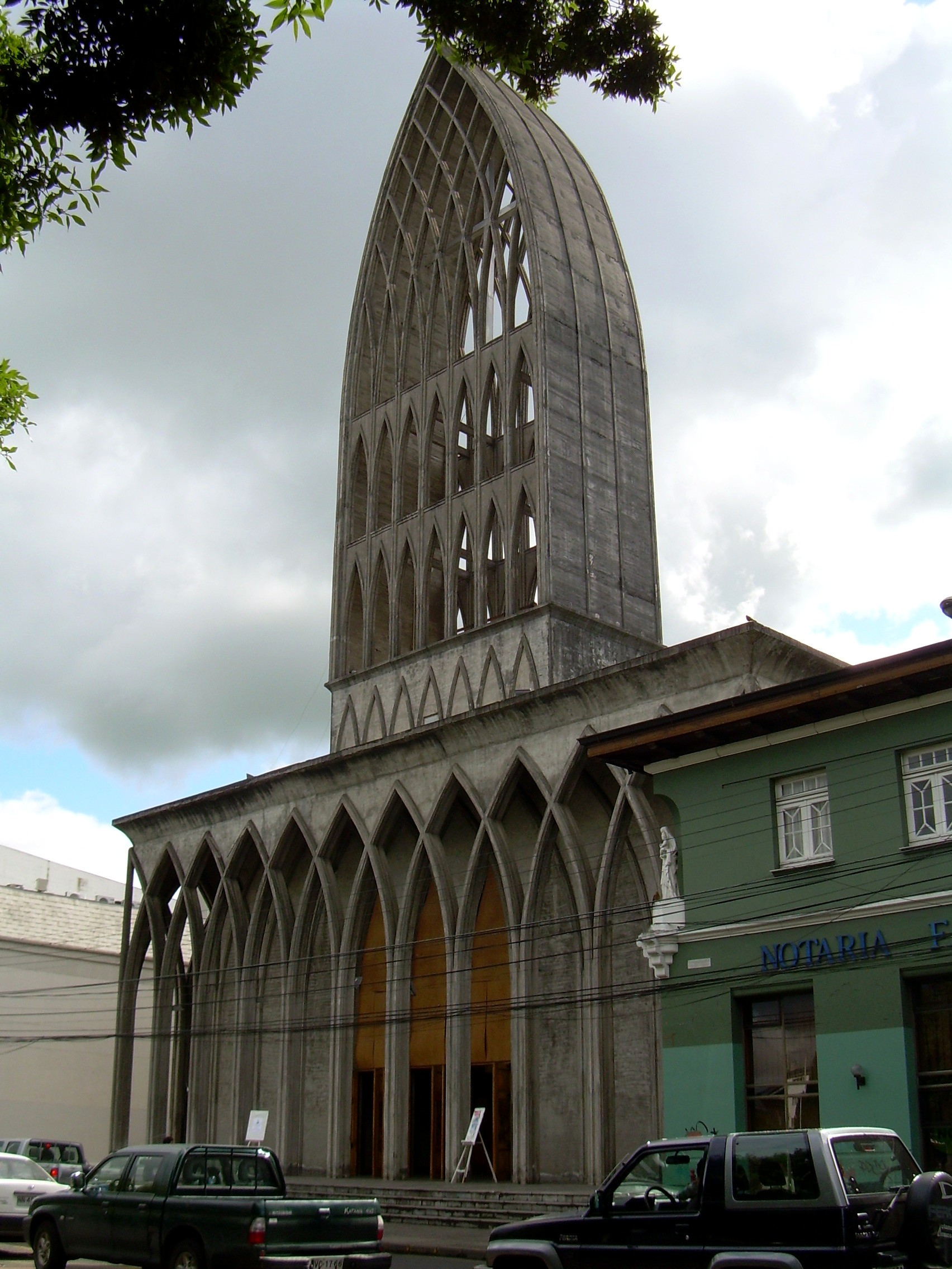 Fachada catedral de Osorno.jpg